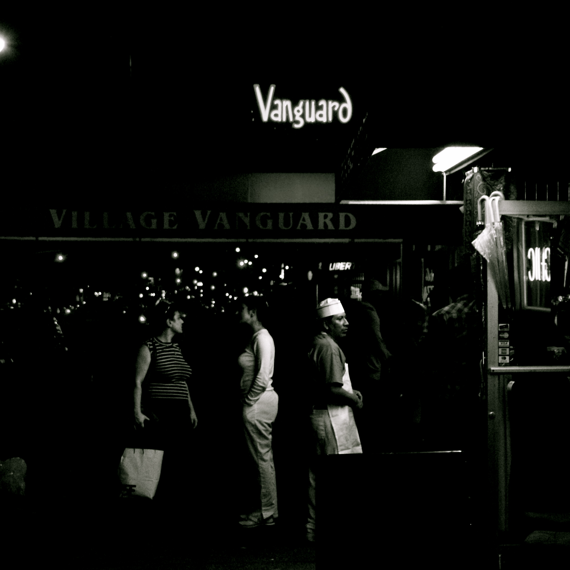 villagevanguard.jpg